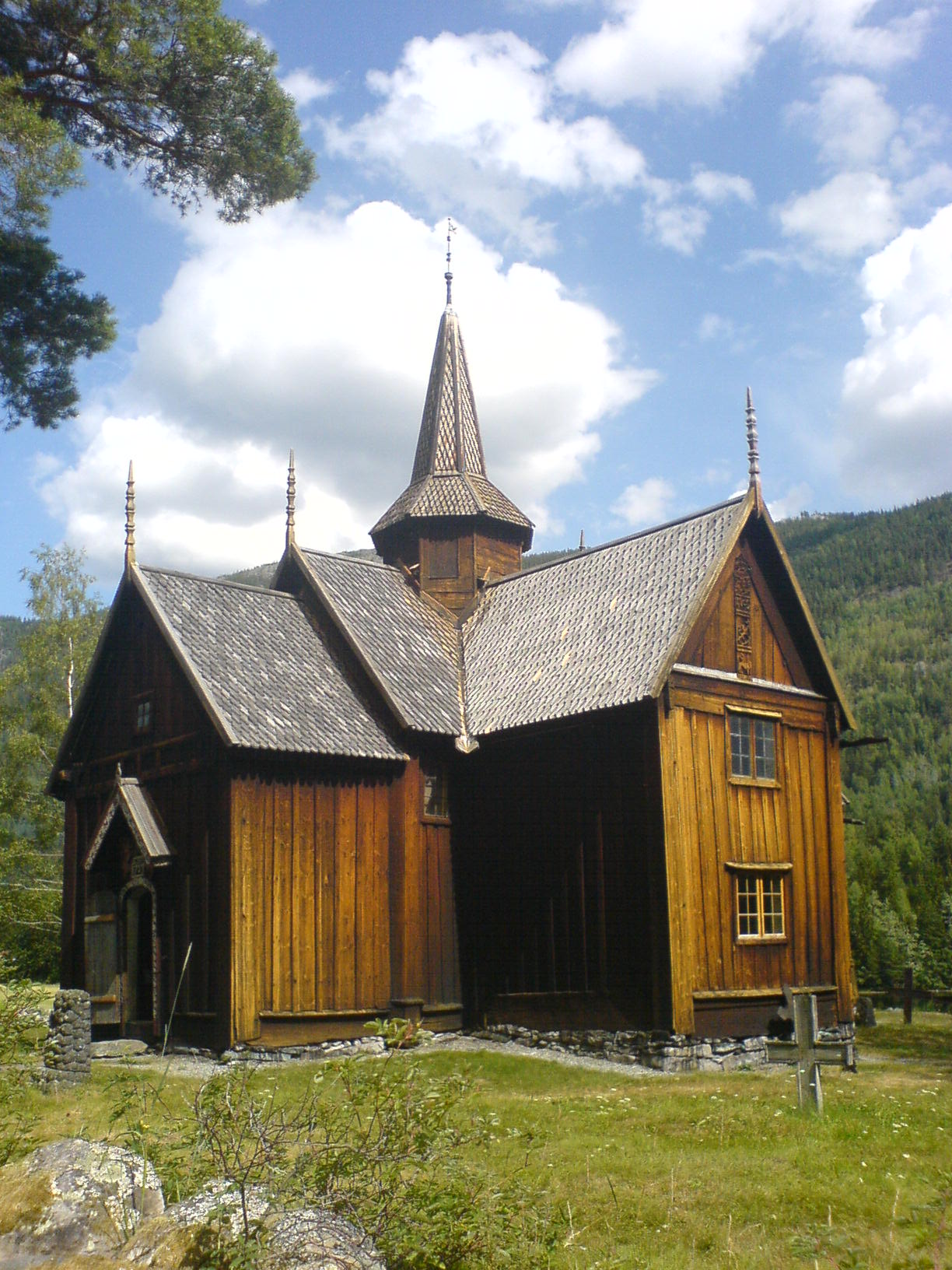 no: Nore stavkyrkje en: Nore stave church Norway 2006